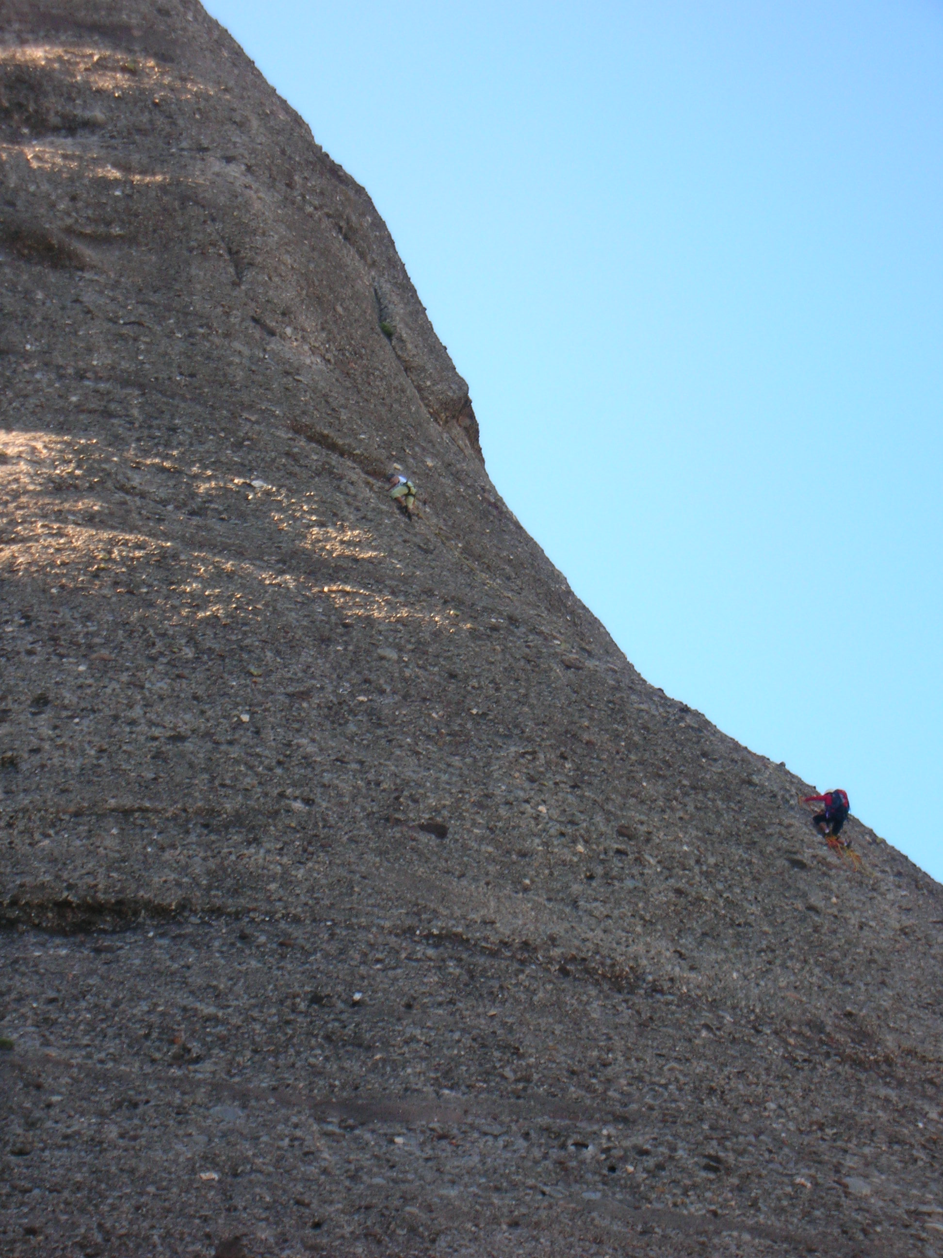 Escaladors de la Gorra Frígia, Montserrat.